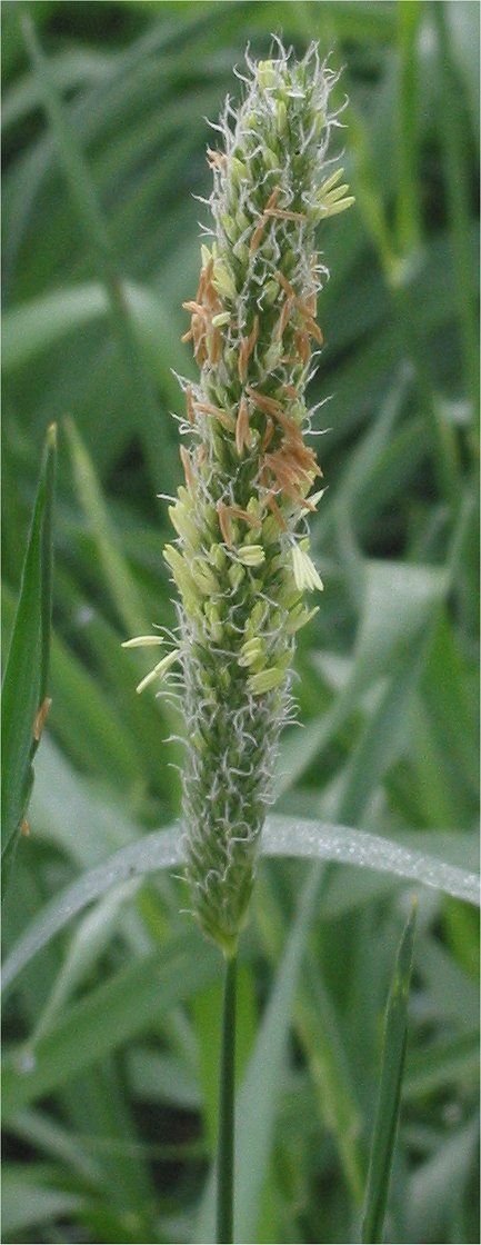 (Grote vossenstaart) Alopecurus pratensis